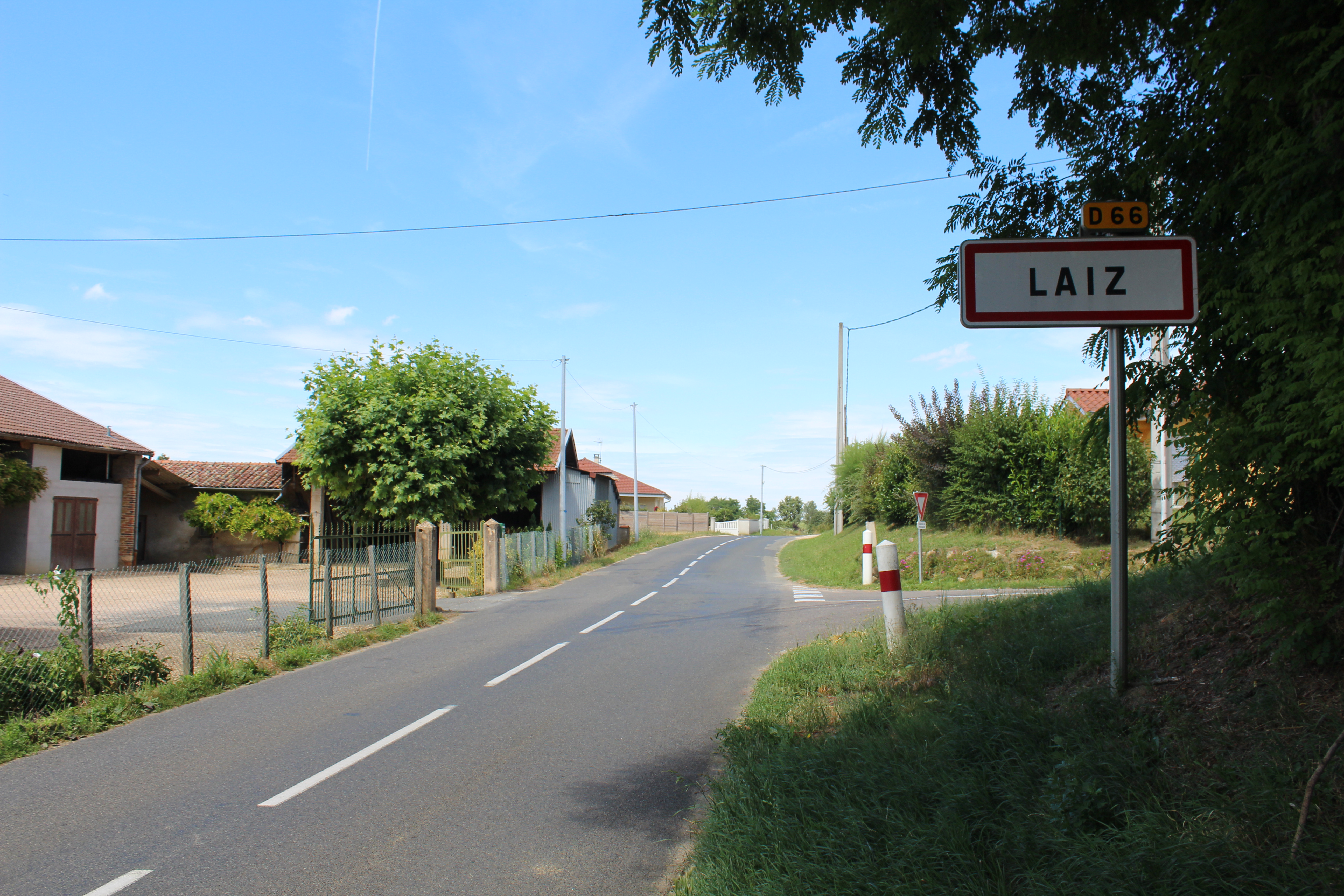 Panneau d'entrée de Laiz.